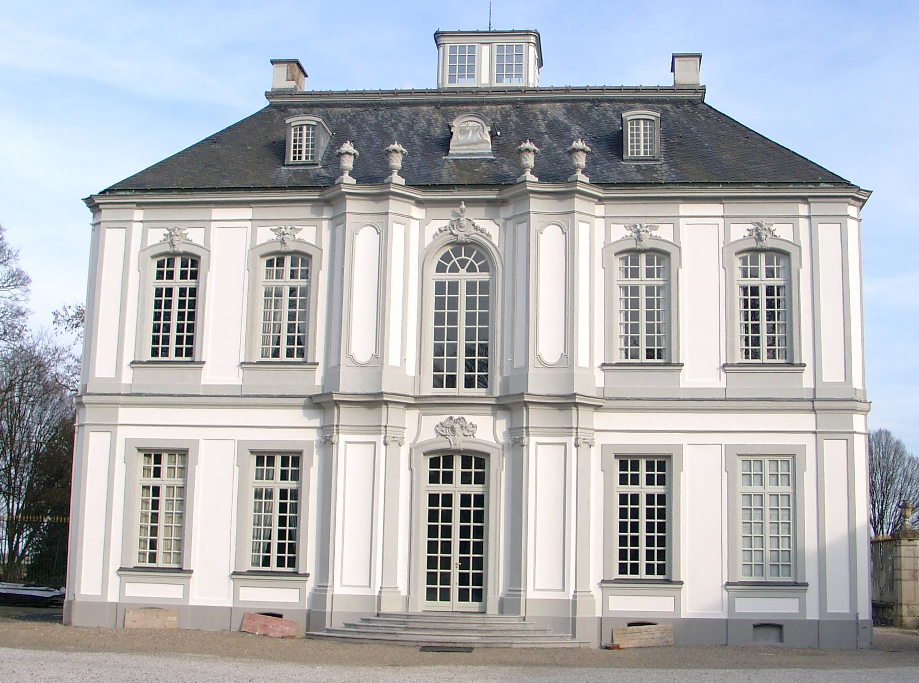 Schloss Falkenlust in der Stadt Brühl